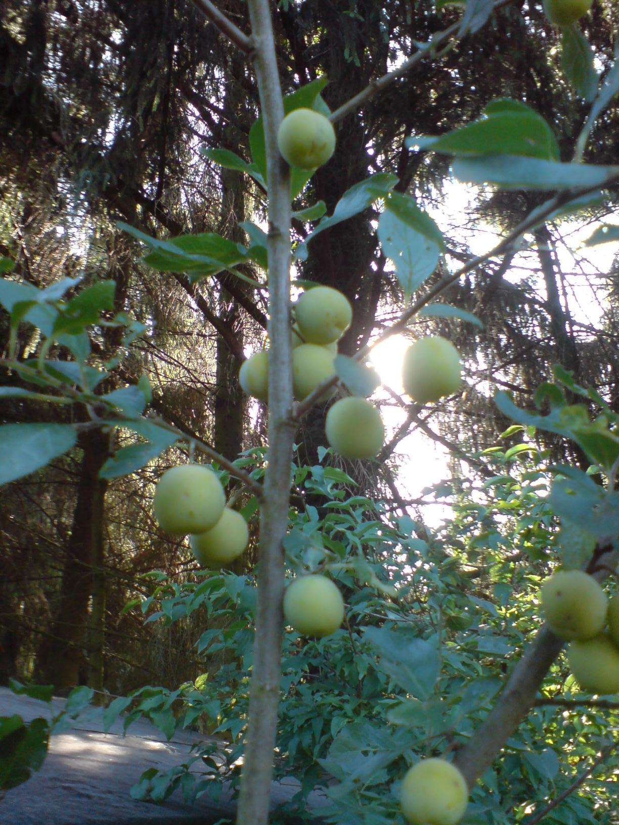 Mirabelle von Flotow